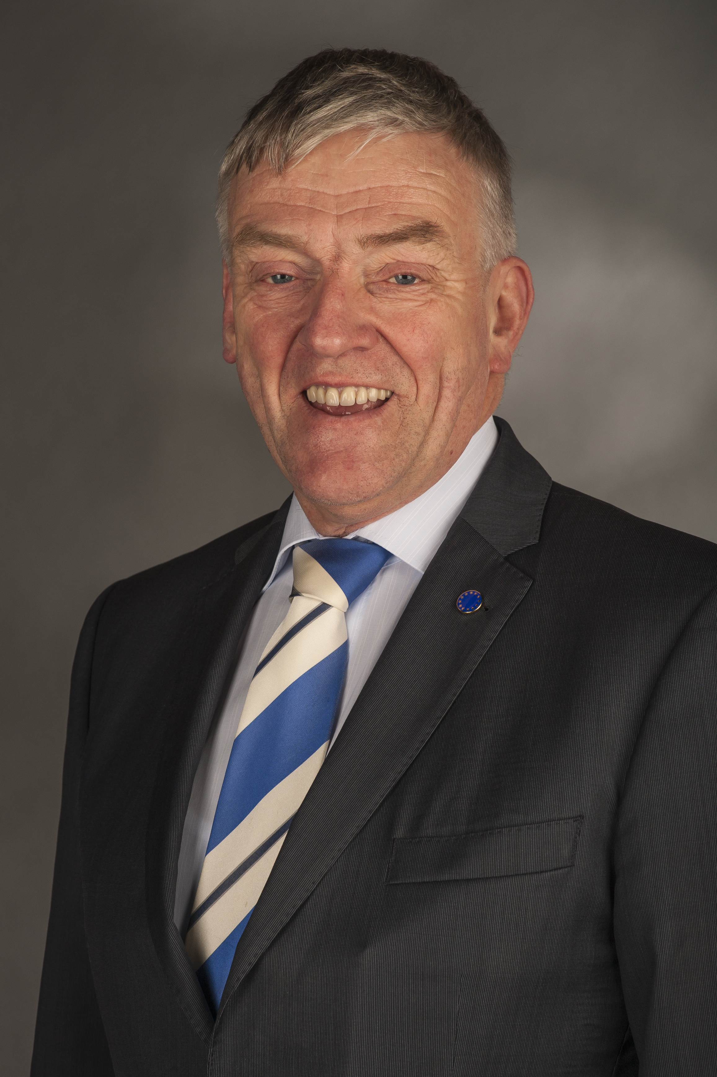 Wim van de Camp